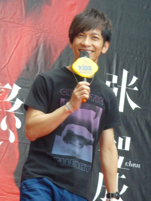 2009.8.29張智成，高雄夢時代[暗戀]簽唱會